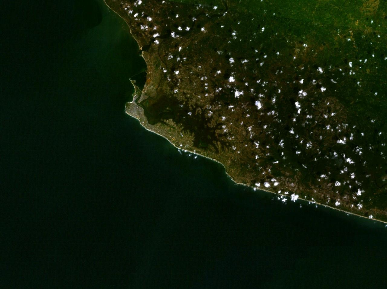 Monrovia